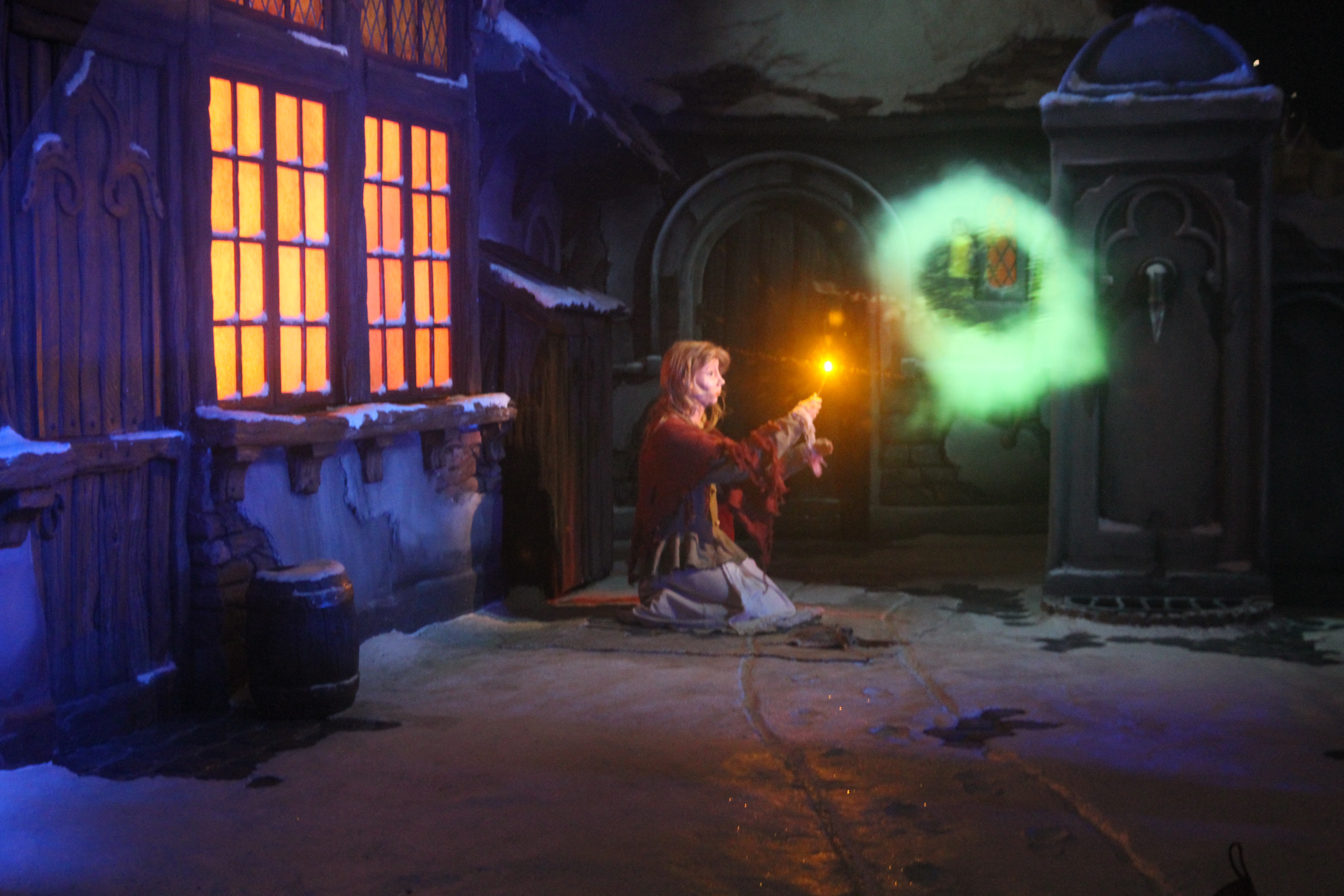 Meisje met de zwavelstokjes